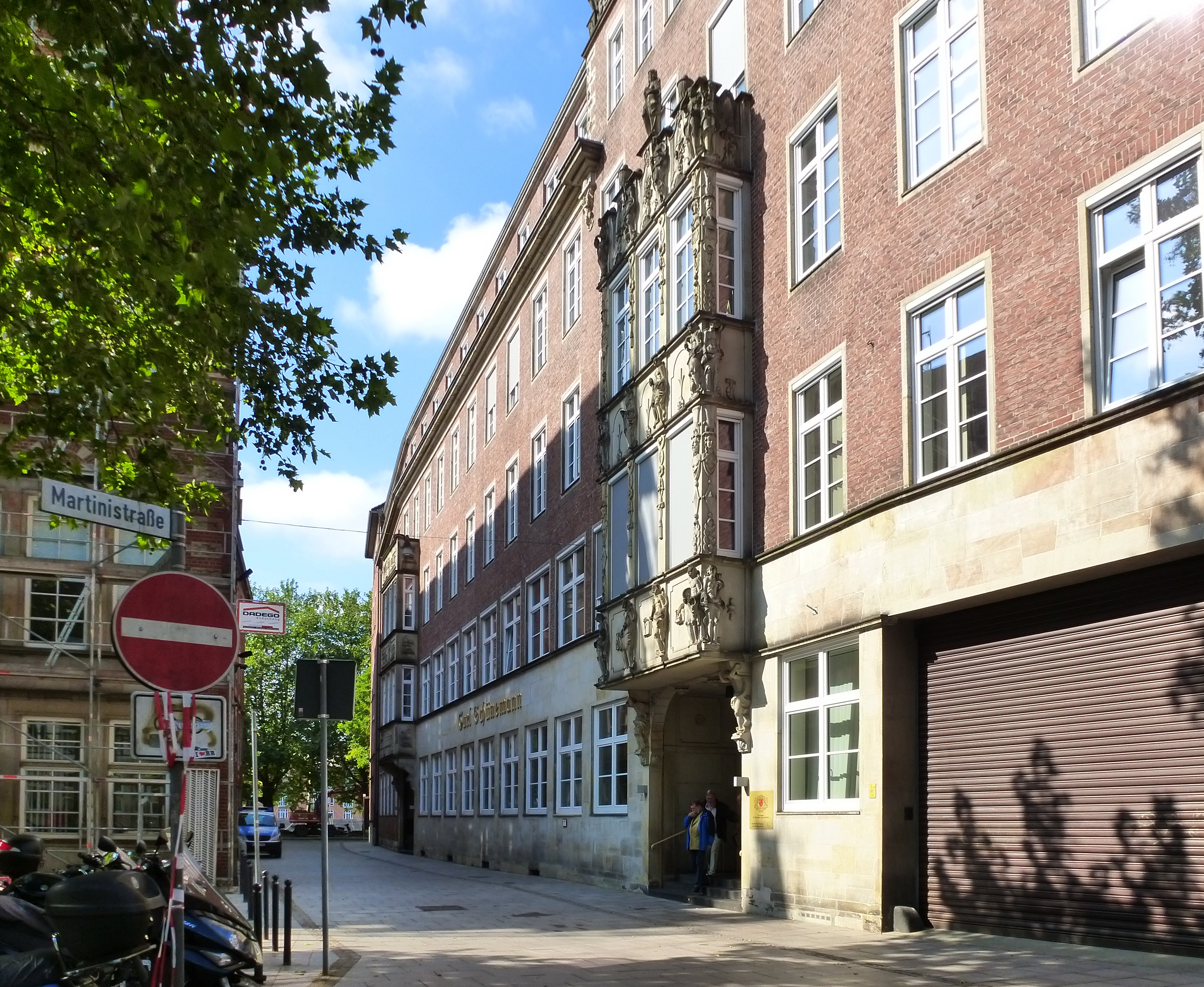 Schünemannhaus, Senator für Wirtschaft und Häfen in Bremen, Schlachte 10Das abgebildete Objekt ist ein geschütztes Kulturdenkmal in der Freien Hansestadt Bremen, mit der Nr. 0855 beim Landesamt für Denkmalpflege registriert.